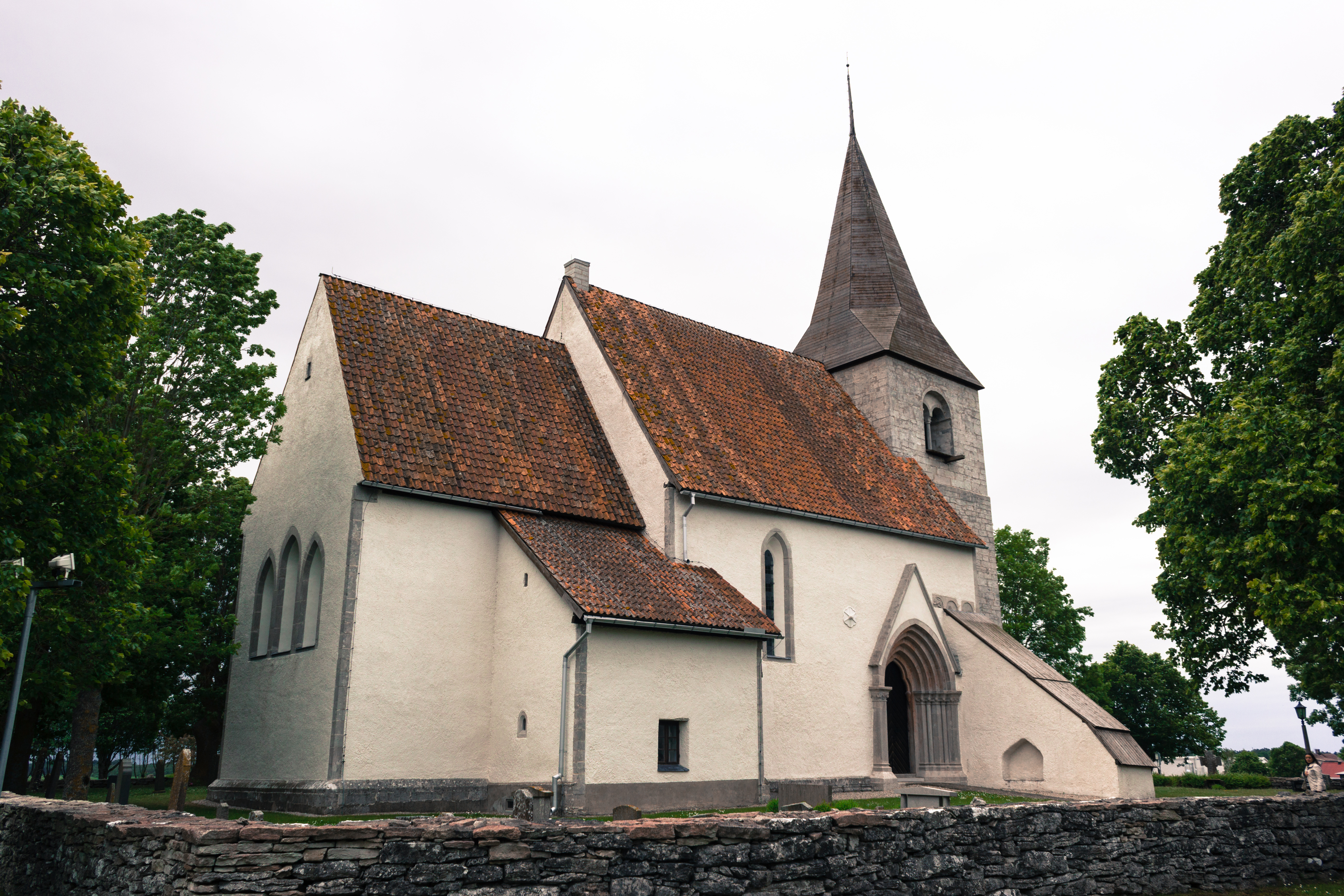 Igrexa de Hejnum, na illa sueca de Gotland.